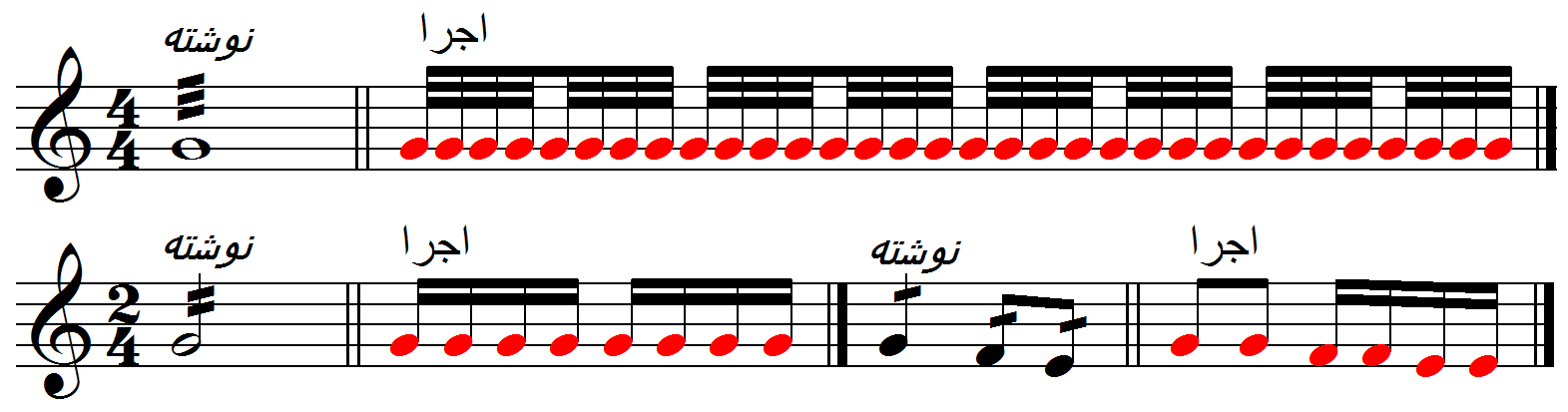 علامت اختصاری تکرار نت